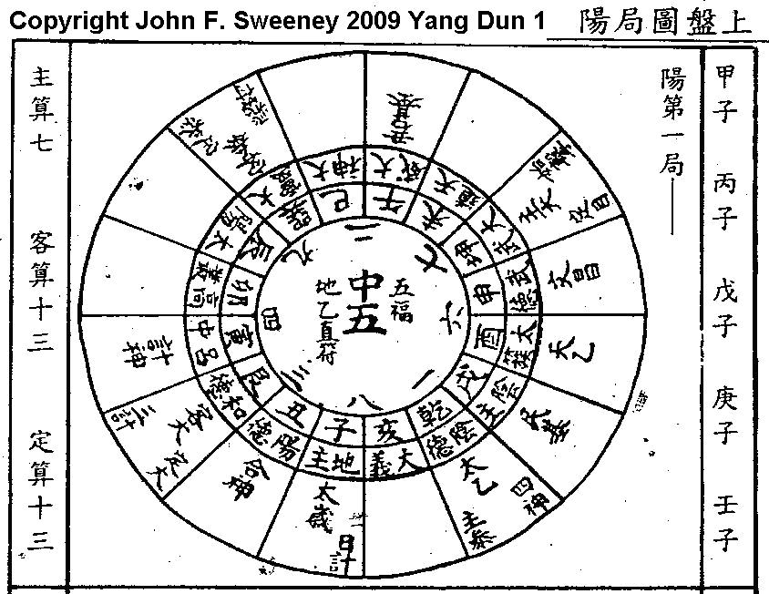 Yang Dun 01 Array for Tai Yi